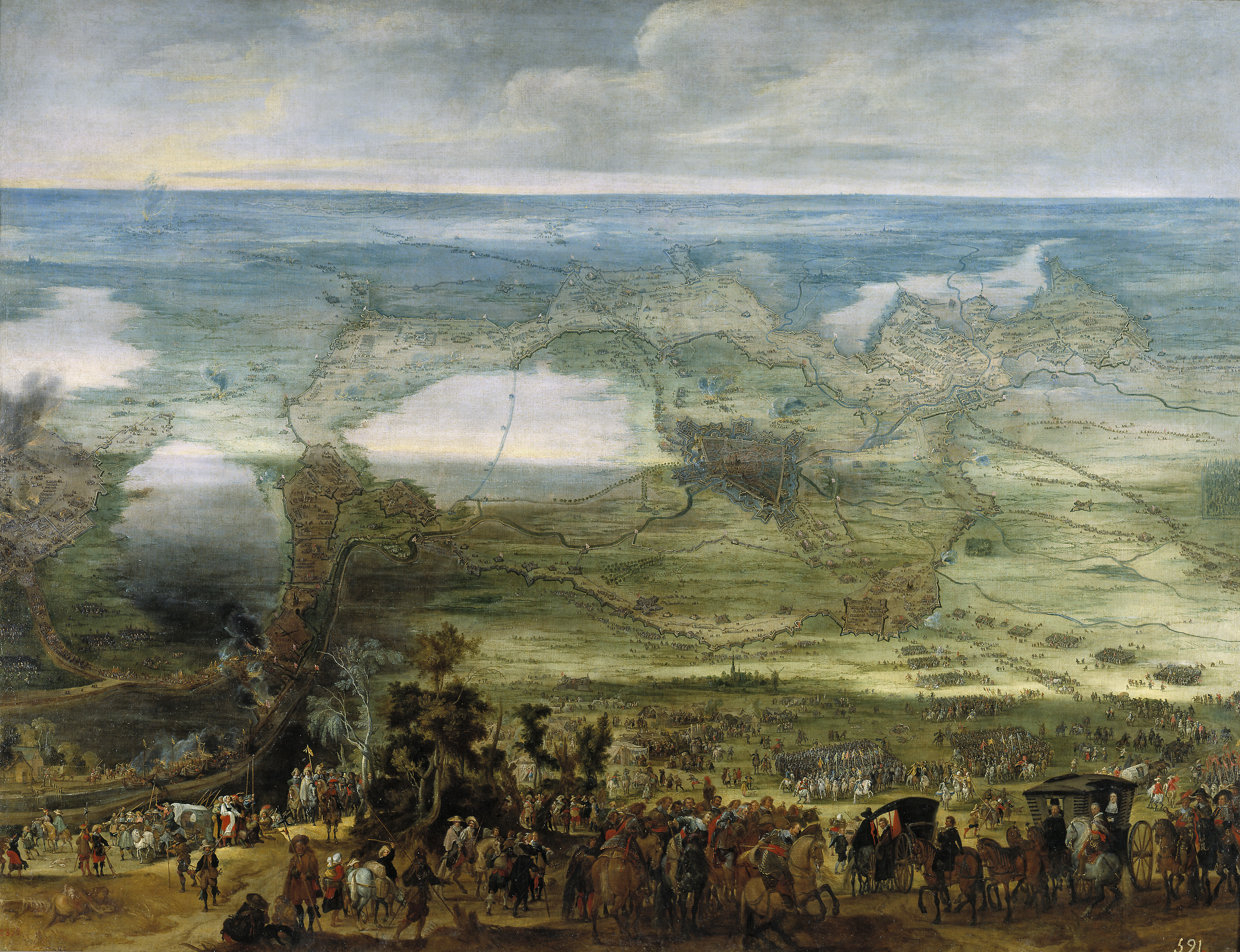 La obra muestra a la infanta Isabel Clara Eugenia (1566-1633), que fue hija del rey Felipe II de España y soberana y posteriormente gobernadora de los Países Bajos, presenciando el sitio de Breda.